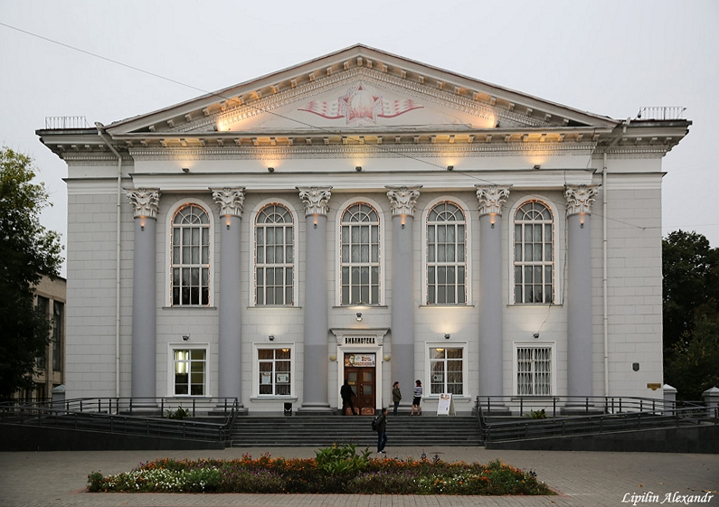 Гомельская бібліятэка